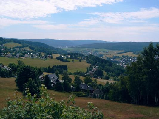 Blick vom Aschberg nach Klingethal, Sachsen, Deutschland